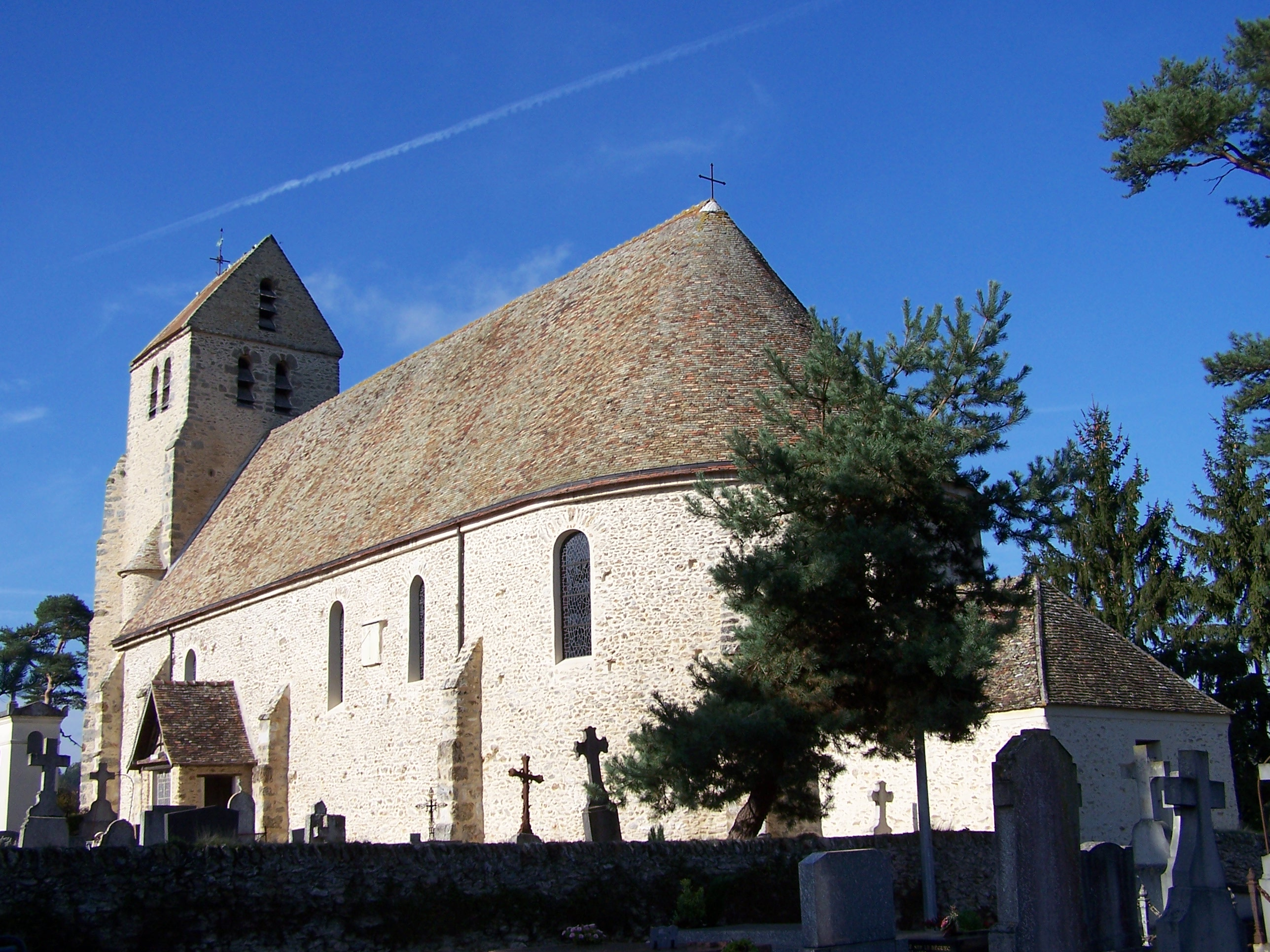 Église de Grosrouvre (Yvelines, France), côté ouest